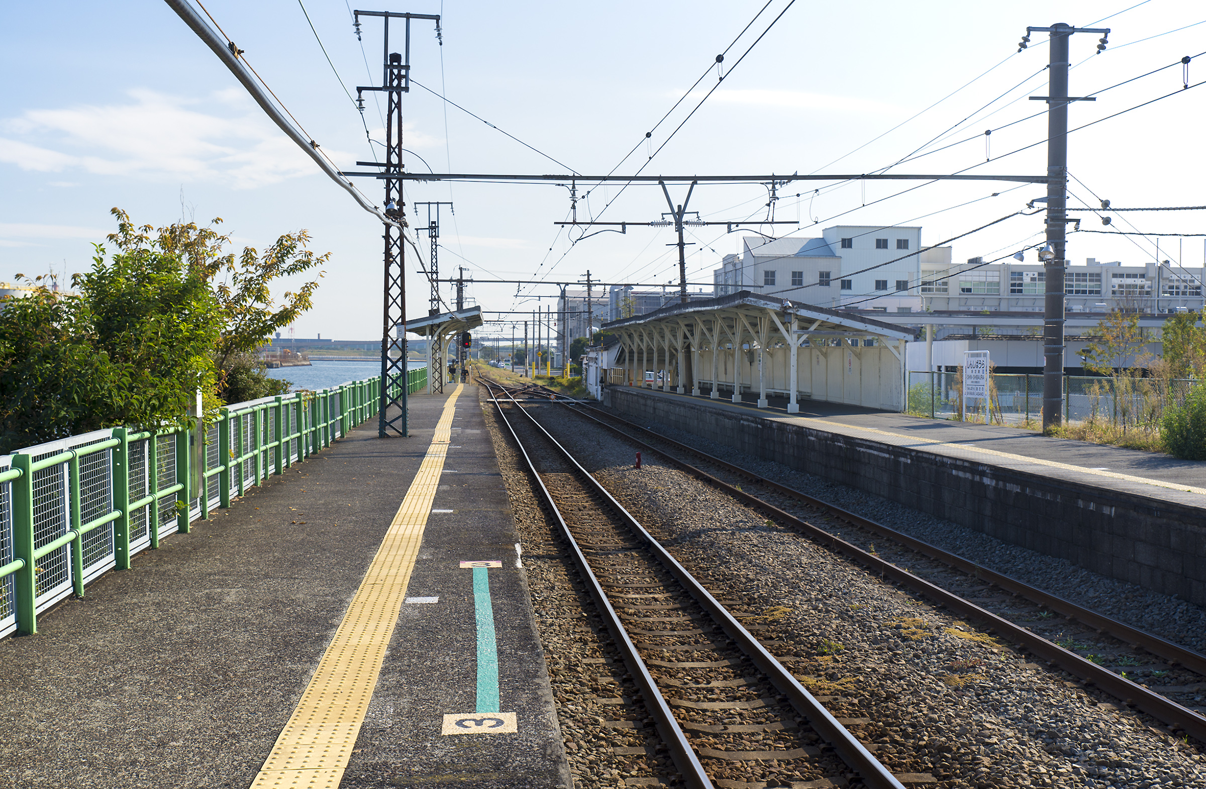 東日本旅客鉄道株式会社鶴見線新芝浦駅ホーム